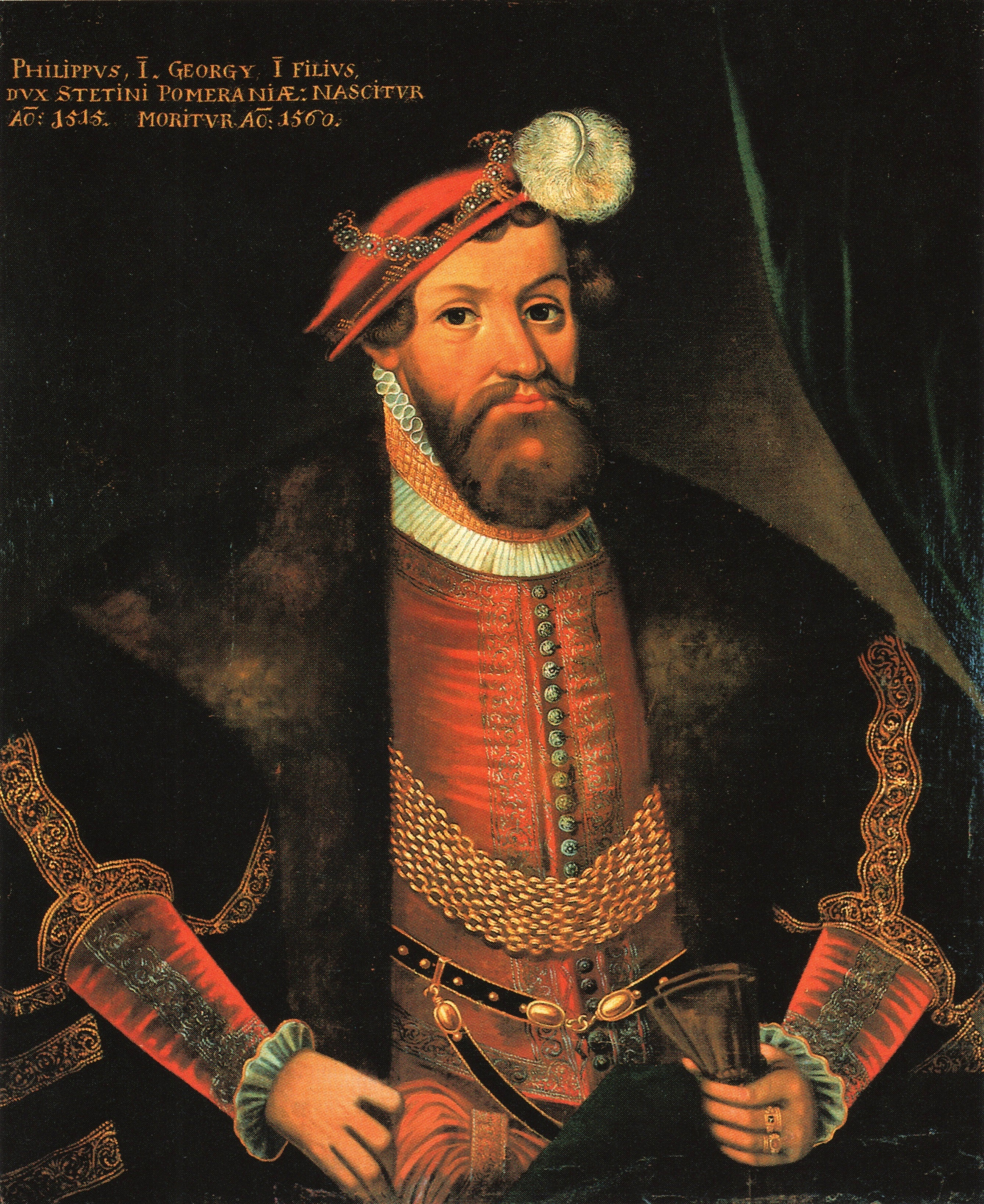 Ölgemälde von Herzog Philipp I. von Pommern, Kopie nach einer Vorlage im Alten Rathaus in Anklam